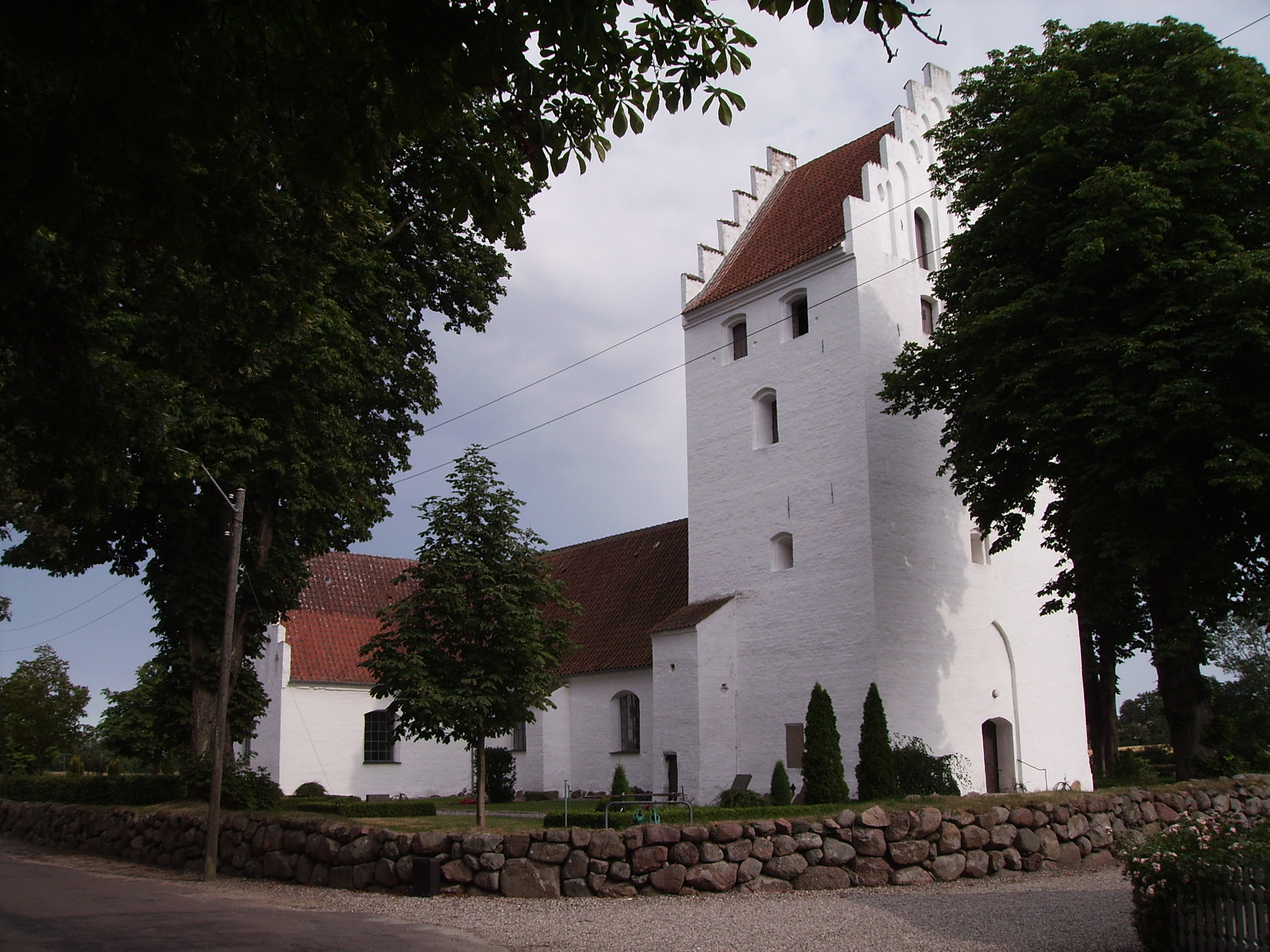 Rynkeby Kirke, Rynkeby Sogn, Bjerge Herred, Odense Amt, Denmark (Danish Church)